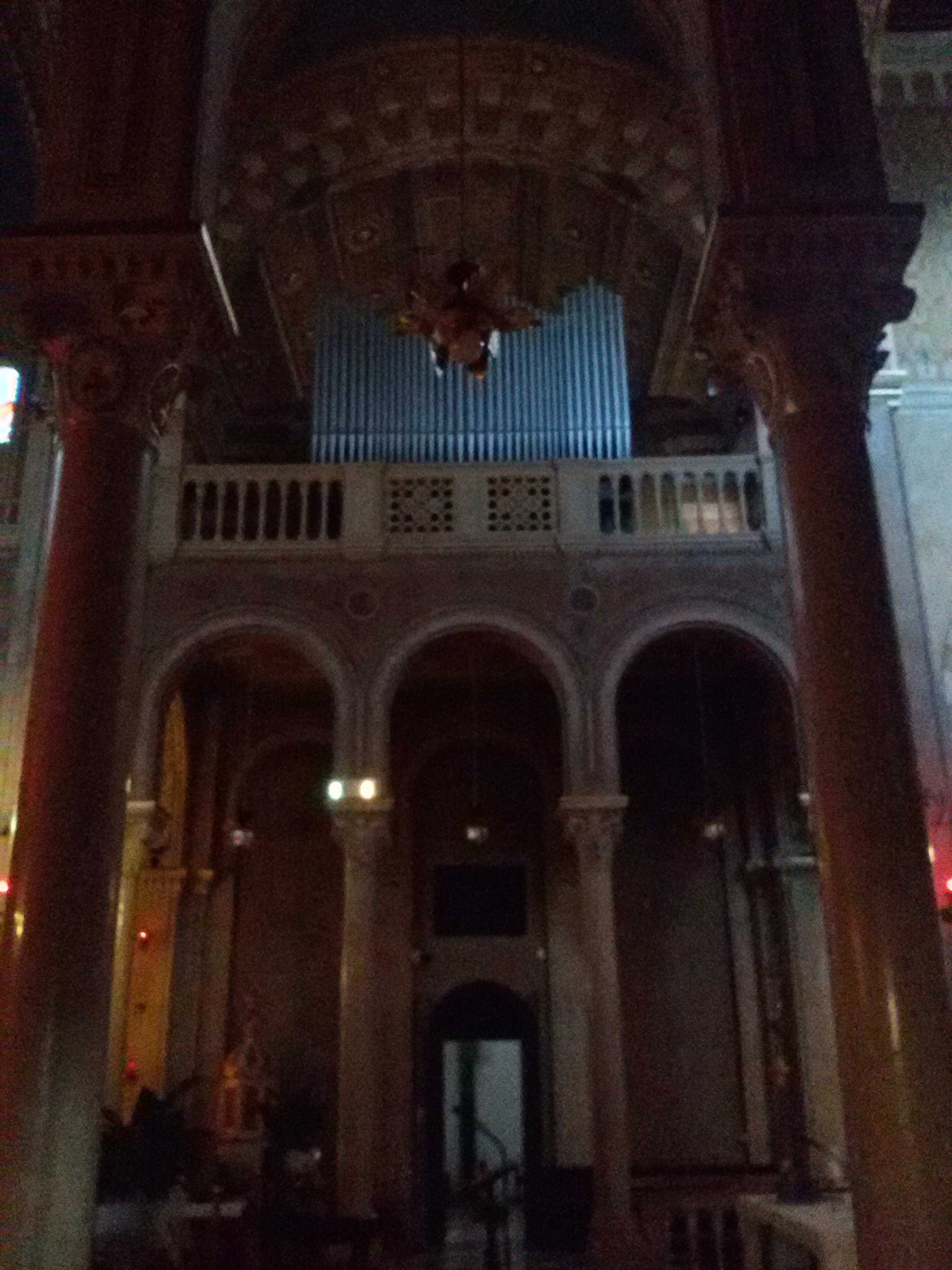 organo